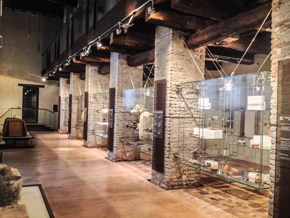 Castello Estense di Belriguardo This is a photo of a monument which is part of cultural heritage of Italy.